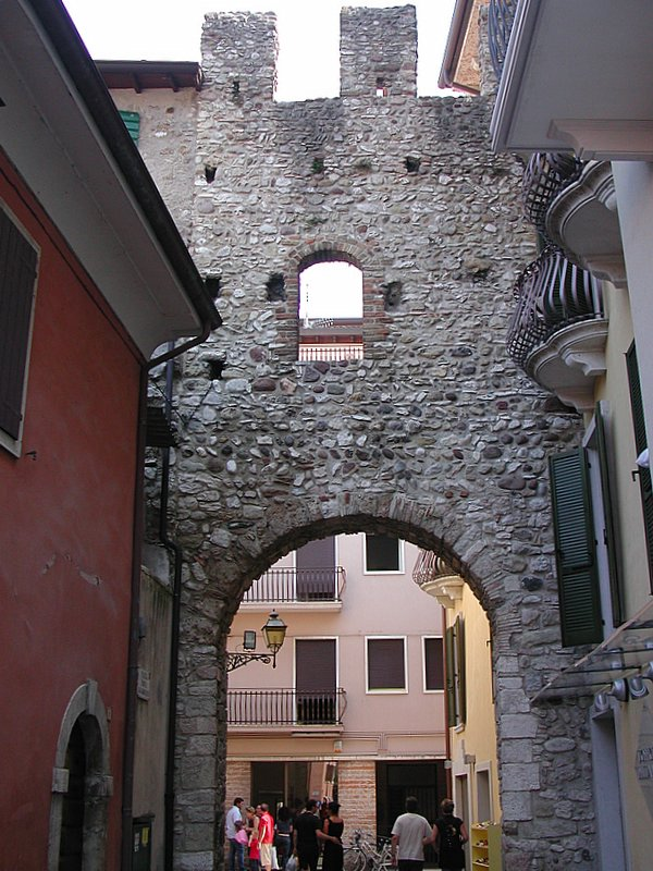 Porta San Giovanni in Bardolino Source: photo uploaded by User:RicciSpeziari. Photographer: Riccardo Speziari